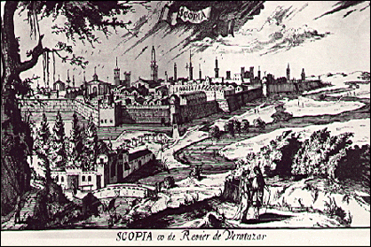 Gravur von Skopje im Jahre 1694